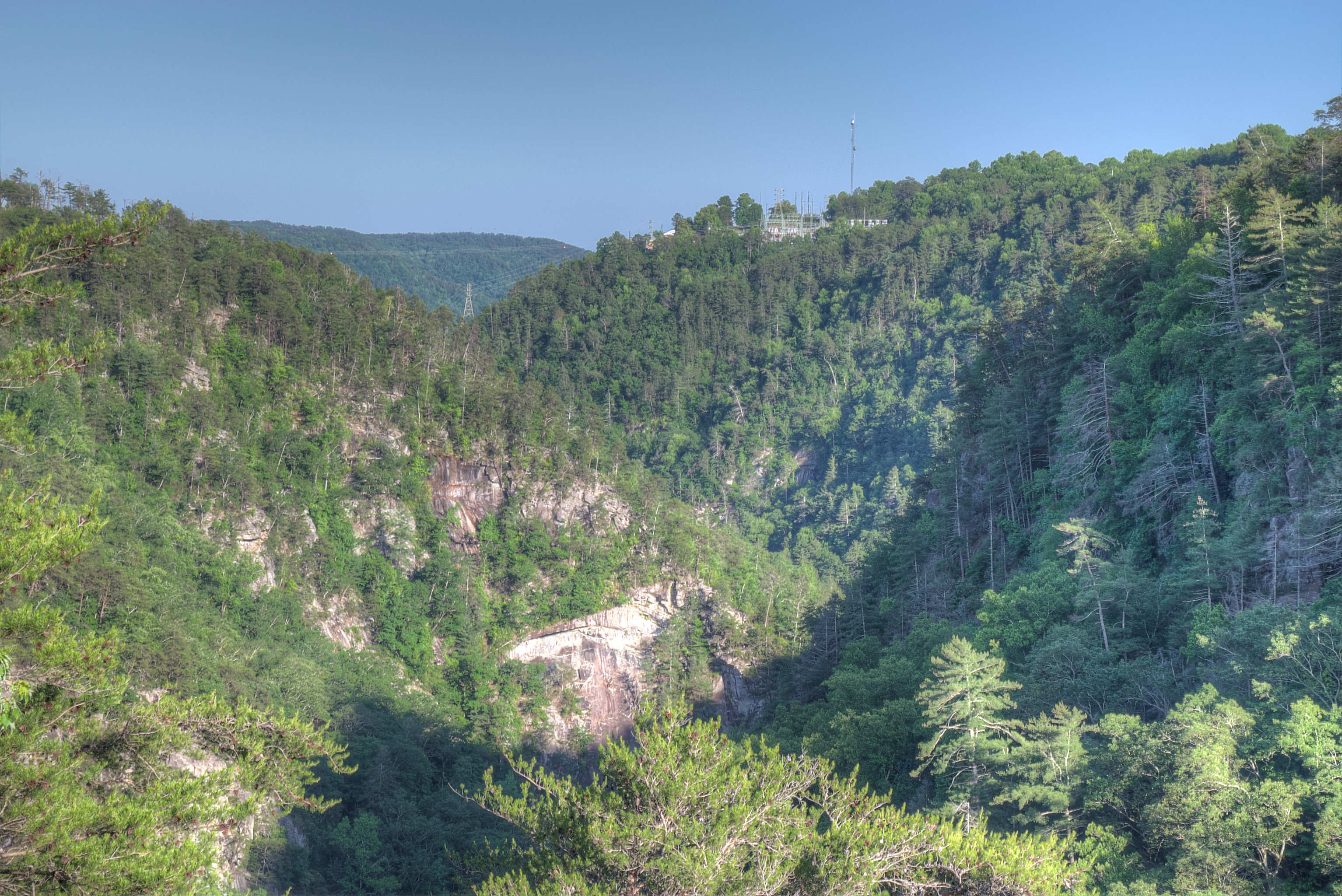 15-18-001: Tallulah Gorge